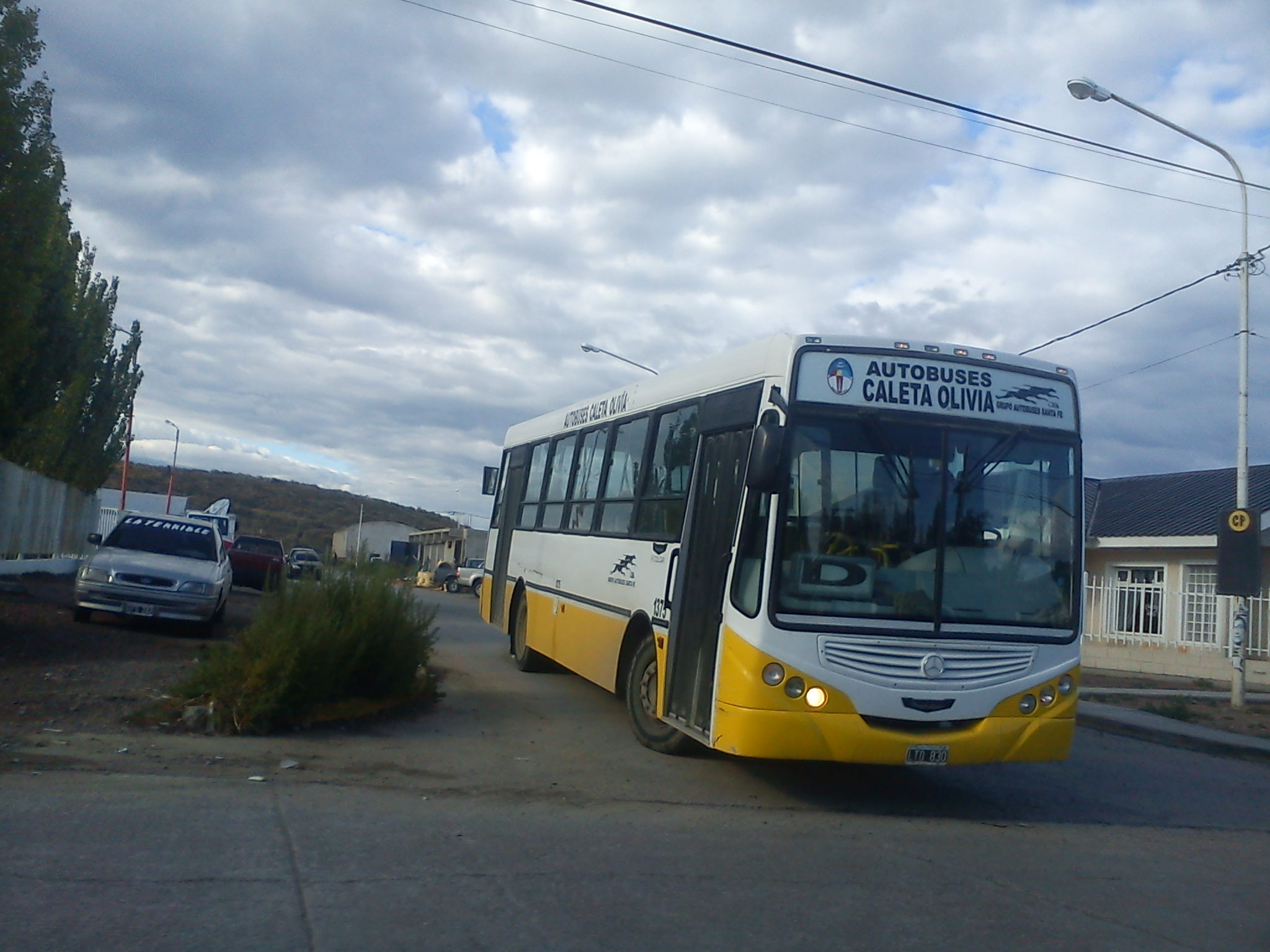 Colectivo